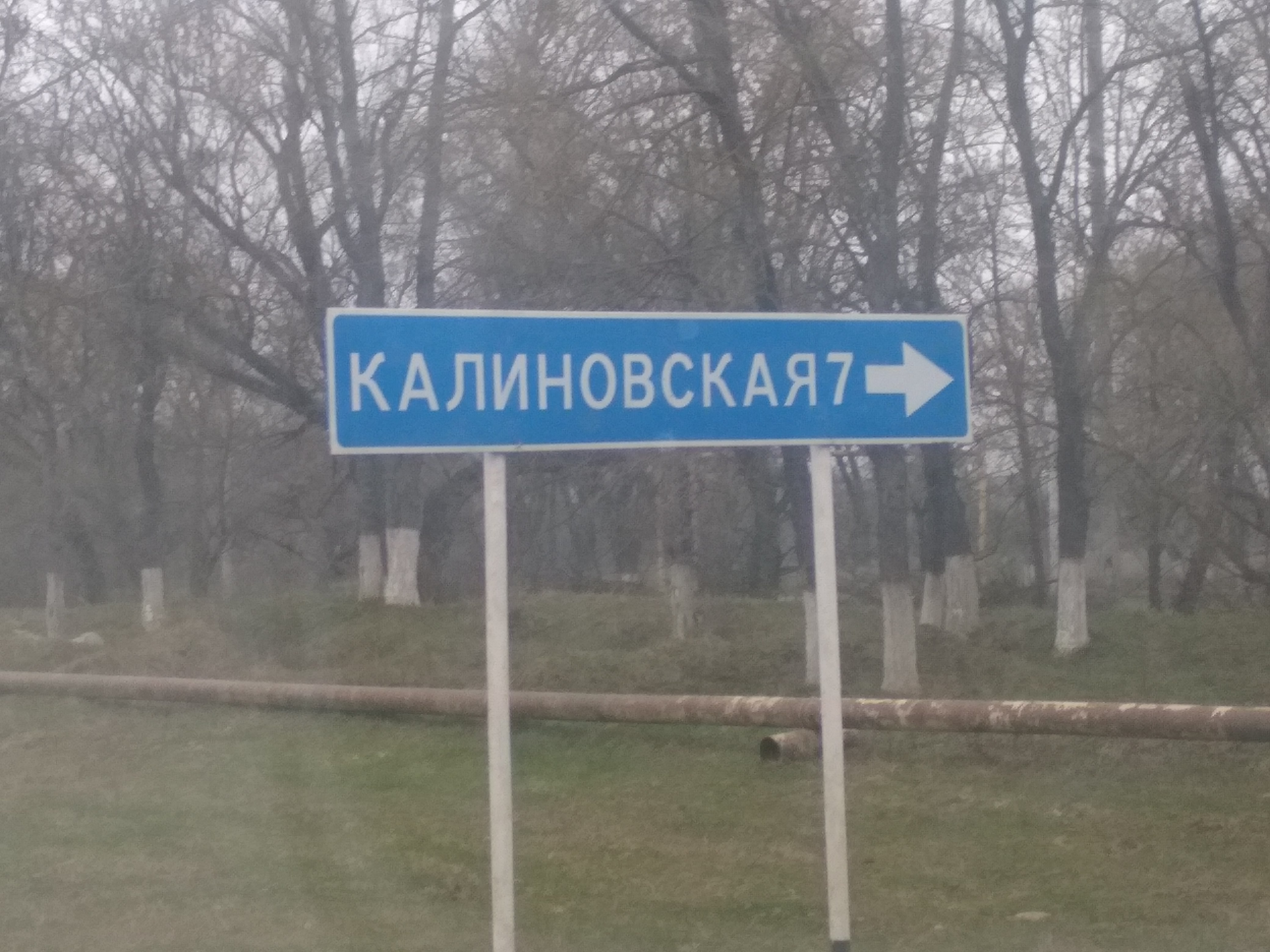 Нохчийн: В Калиновскую